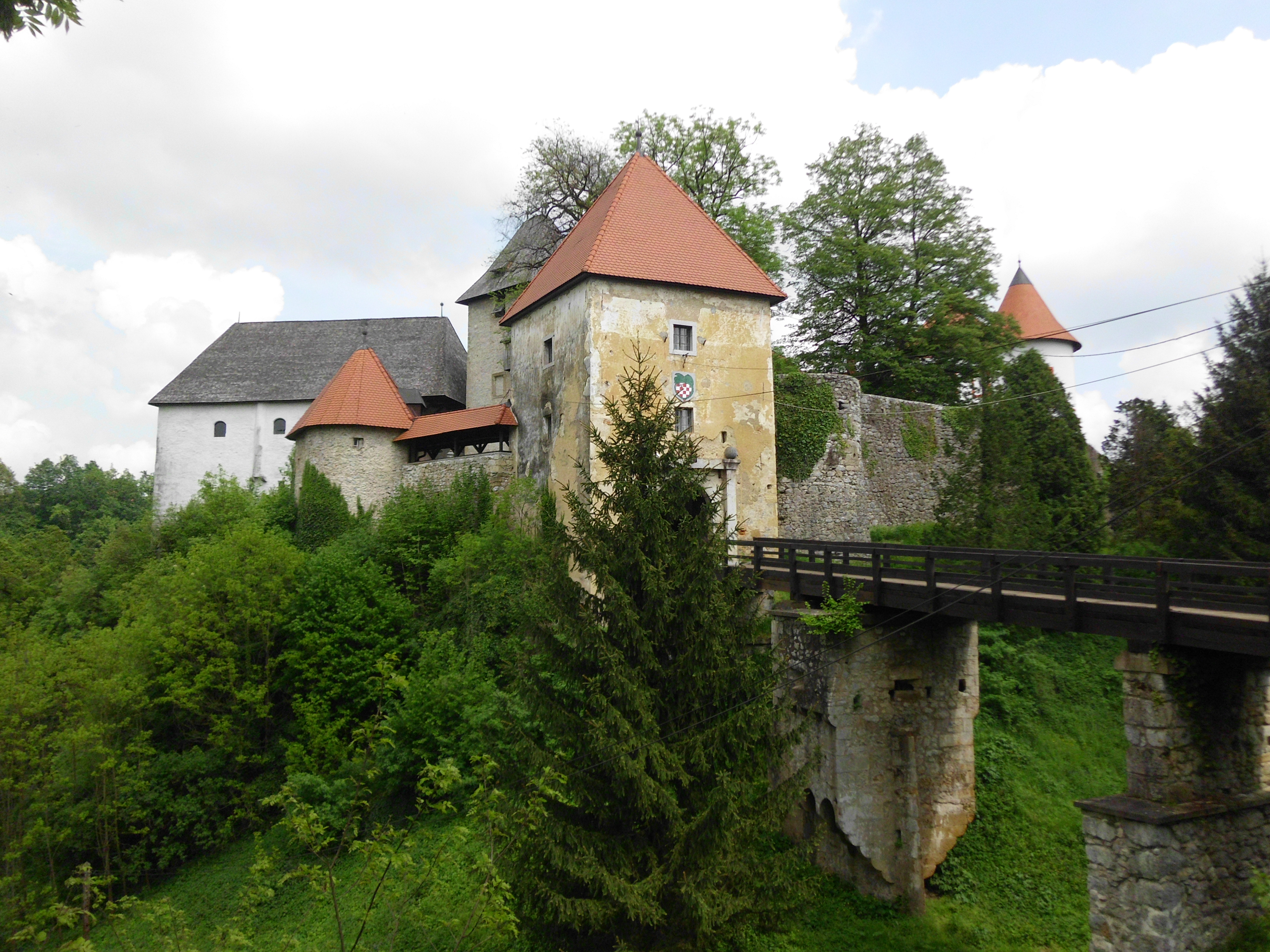 Eingangsbereich